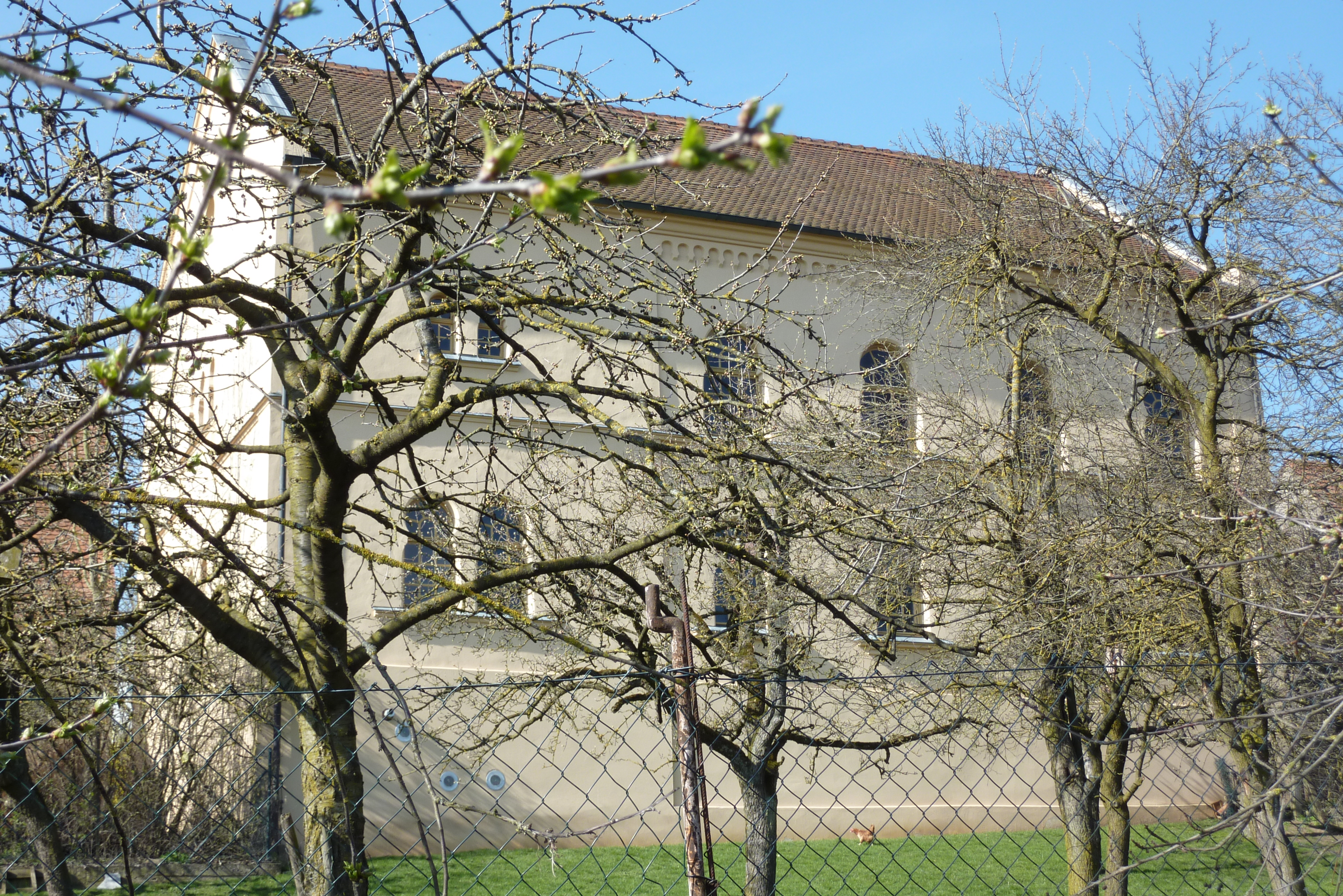 Synagoge (Hainsfarth), Südseite